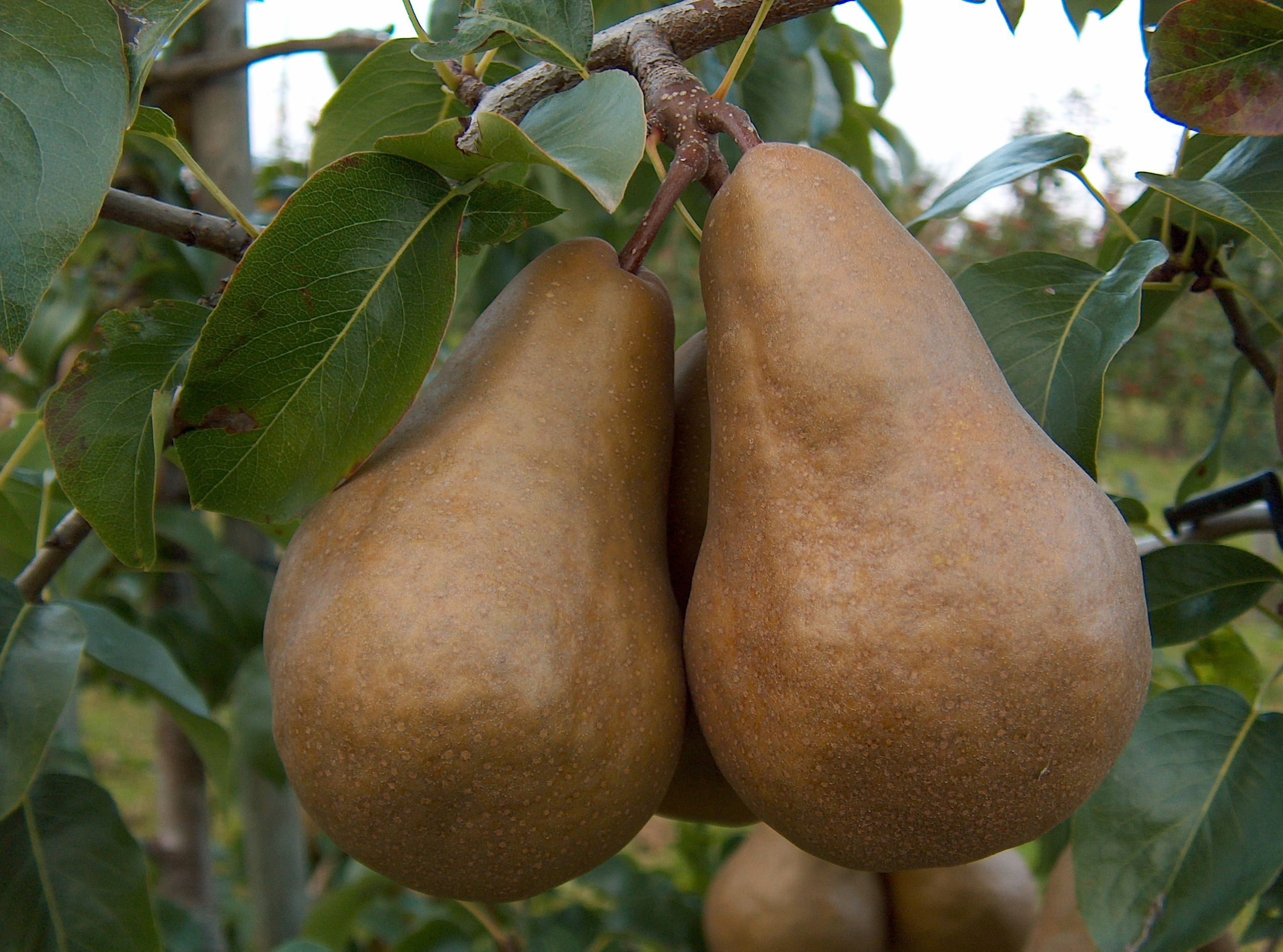 Birne (Pyrus communis) der Sorte Boscs Flaschenbirne am Baum